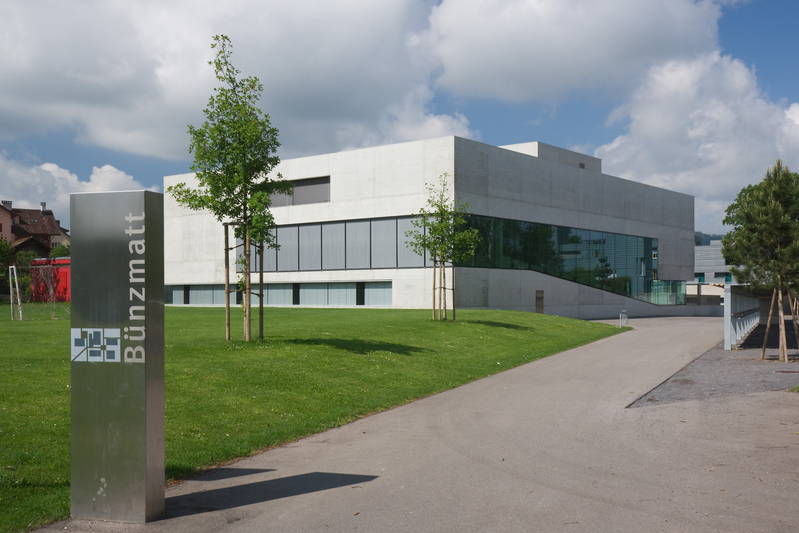 Schulhaus Bünzmatt III bei Wohlen AG, Schweiz. Baujahr: 2008 Architekt: Cornelius Morscher, Bern. Erweiterung der Anlage Primarschulhaus und Schwimmbad Wohlen von 1966/71